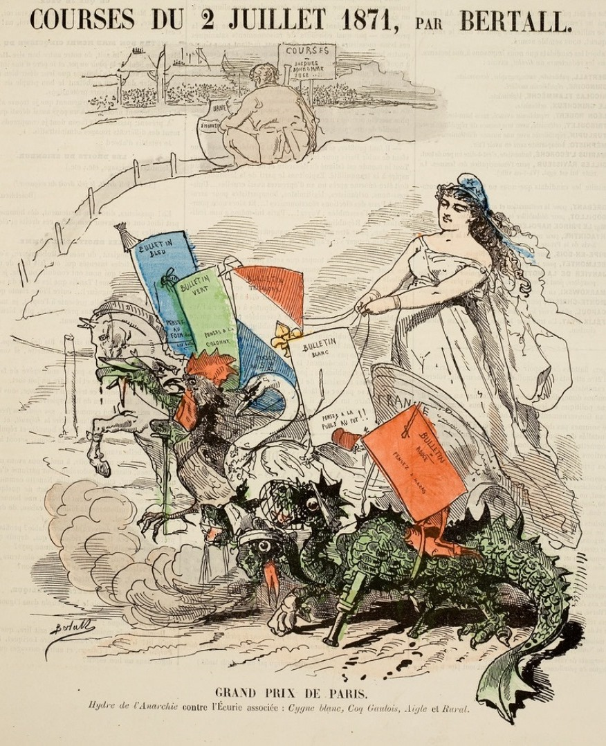 Dessin du Grelot du 25 juin 1871, à propos des élections législatives partielles du 2 juillet 1871. Faisant la course avec l'hydre de l'anarchie, le char de la République est attelé au cygne légitimiste, au coq orléaniste, à l'aigle bonapartiste et au cheval de labour des ruraux.